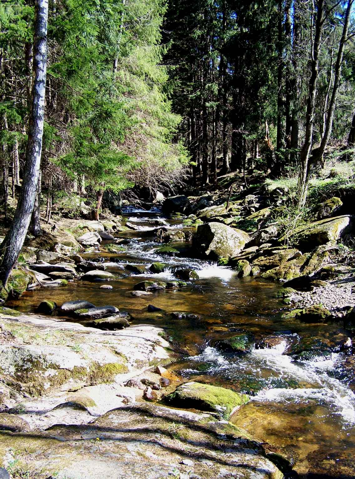 Říčka Černá pod Benešovem nad Černou, nad bývalou sklárnou Gabriela